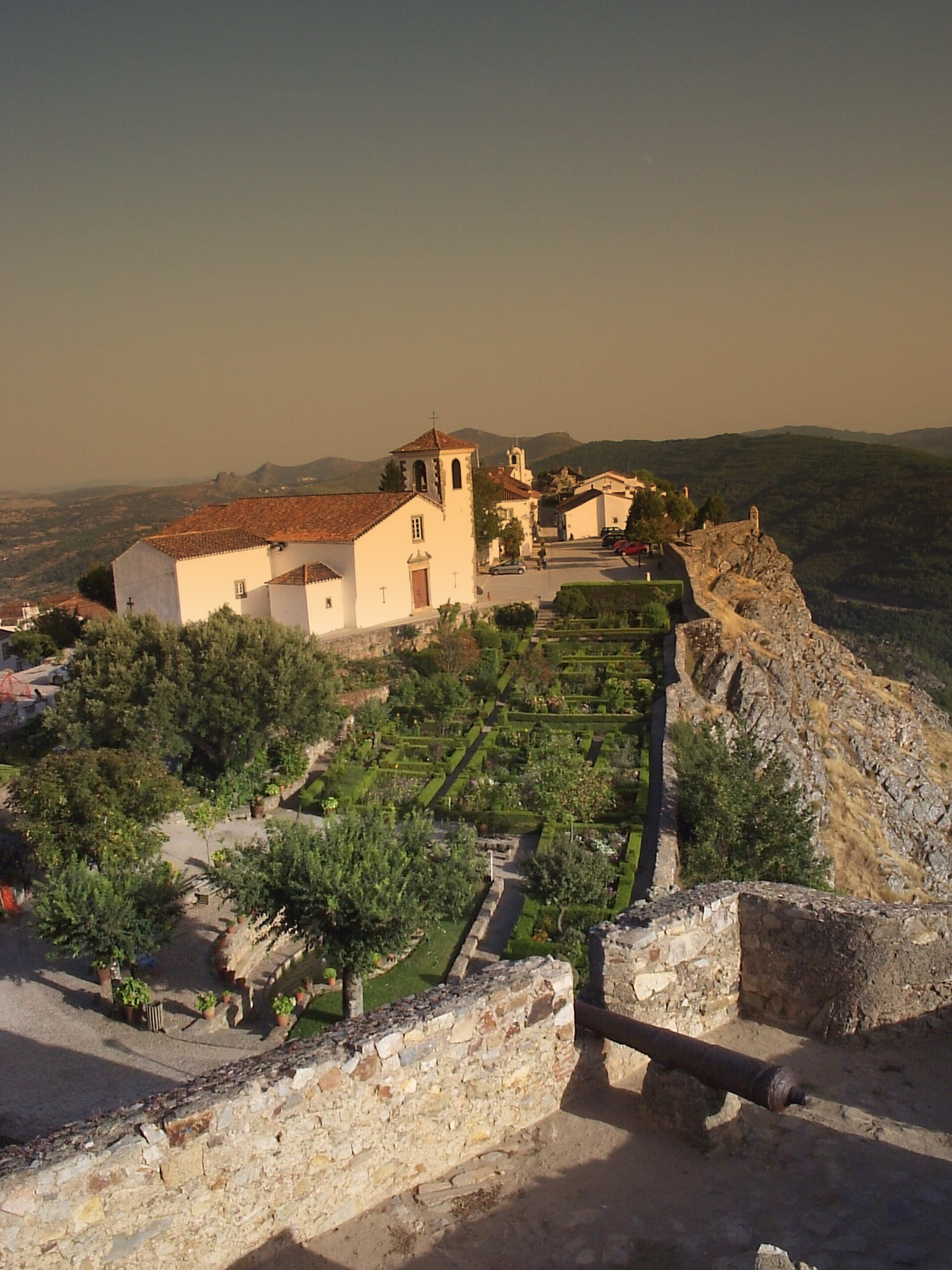 Castelo do Marvão